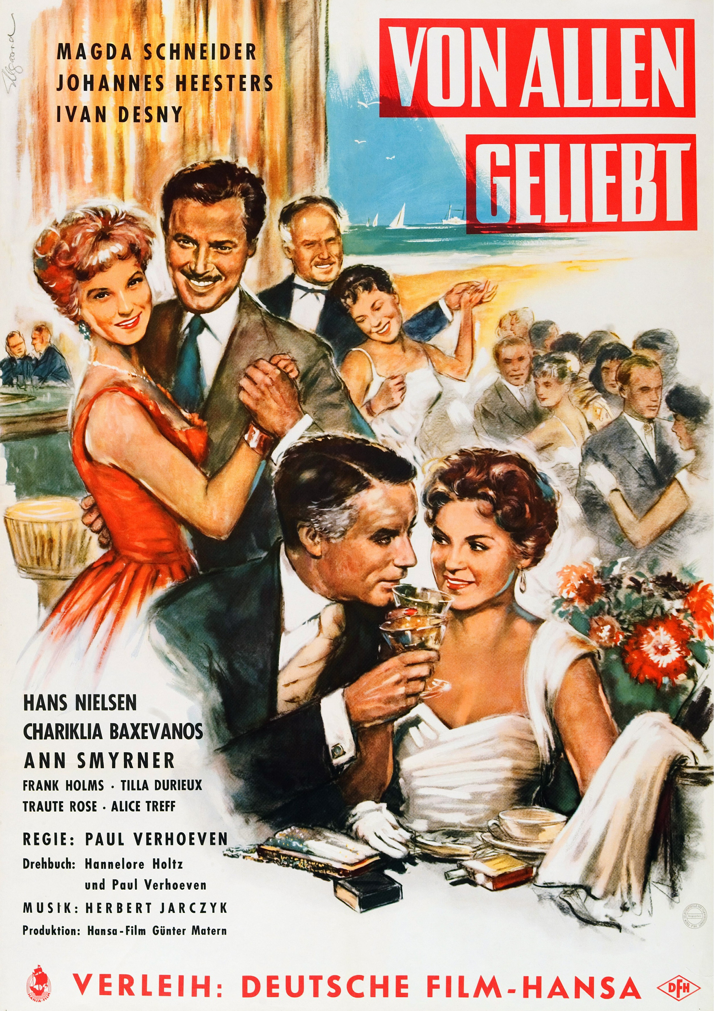 Filmplakat von Helmuth Ellgaard für den Film "Von allen geliebt"